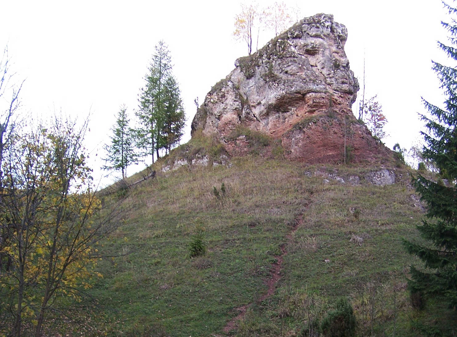 Rezerwat Biała Woda (Pieniny). Czerwona Skałka (Sfinks)